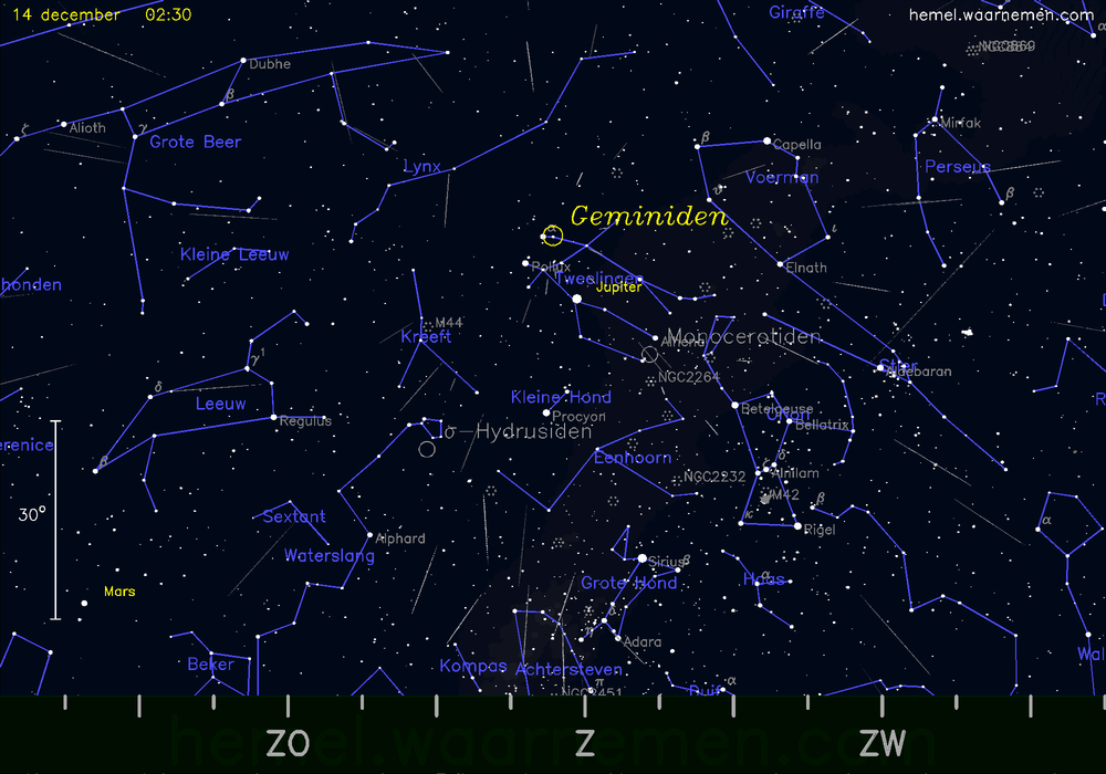 De meteorenzwerm Geminiden tijdens het maximum op 14 december 2013. De radiant van de zwerm is gemakkelijk te herkennen, doordat de planeet Jupiter dichtbij staat. Bron